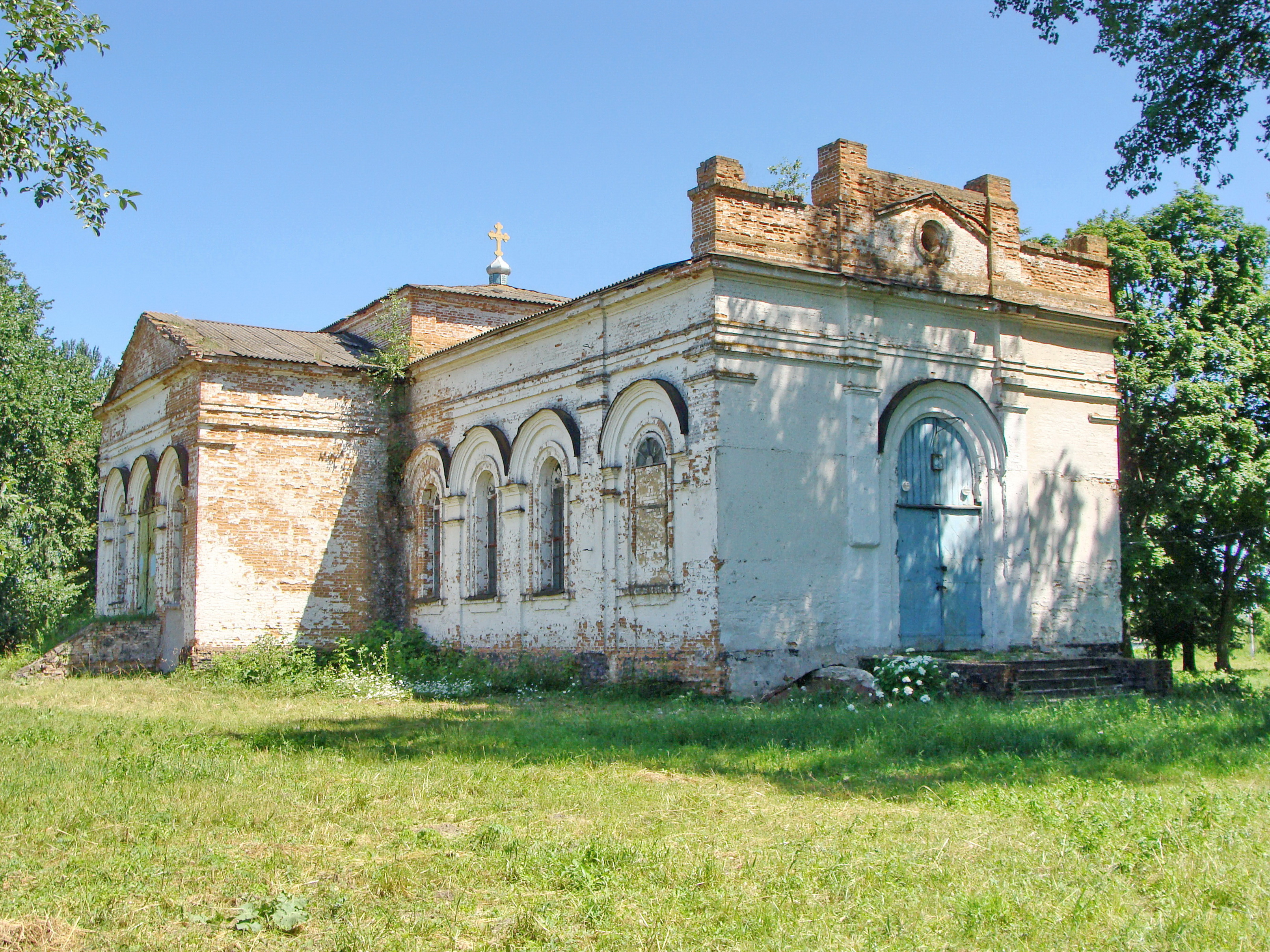 Покровська церква, Конотопський район, с. В'язове.